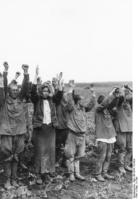 This description has been identified as biased or incorrect: Nazi propaganda descriptionDeutschlands Kampf gegen die Sowjetunion. Mitten zwischen den Gefangenen Sowjetsoldaten steht eine Frau - auch sie hat es aufgegeben, weiteren Widerstand zu leisten. - Es ist ein Flintenweib und zugleich Sowjetkommissarin, die als die verbissensten Heckenschützen die Sowjetsoldaten bis zum letzten Widerstand antreiben.